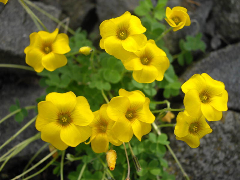 Oxalis lobata